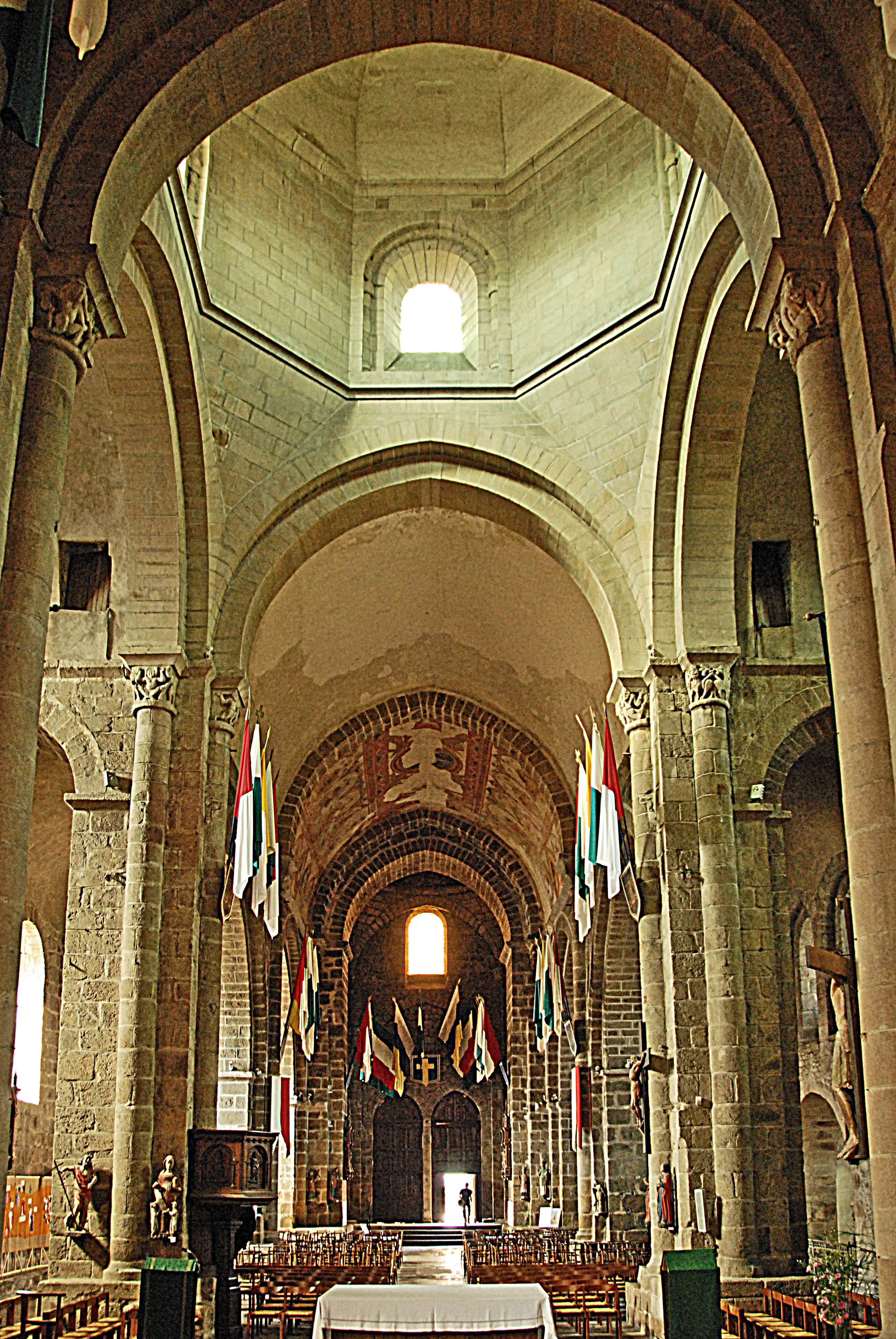 St-Junien. Langhaus aus Vierung